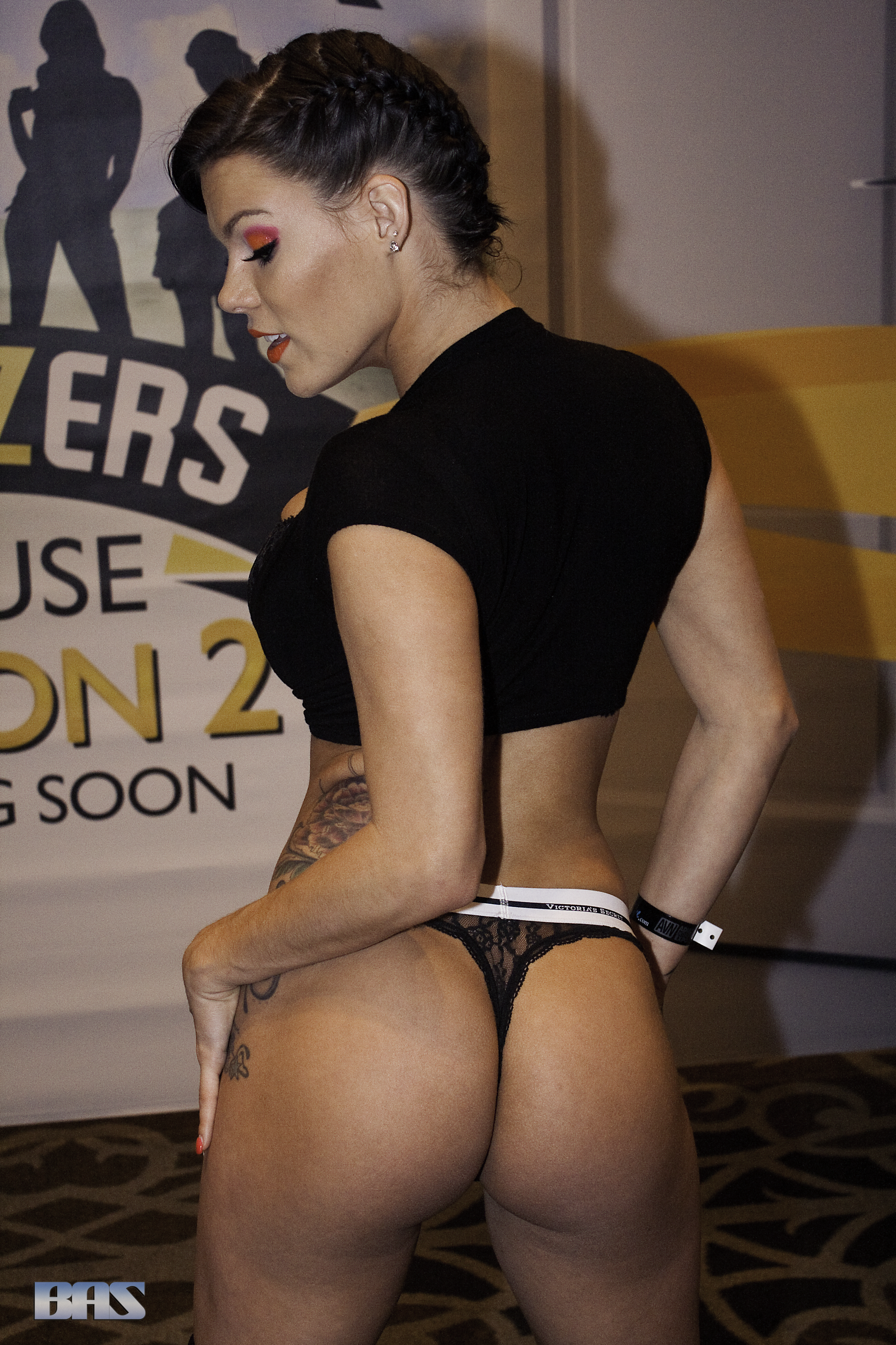 AEE16_0044bas